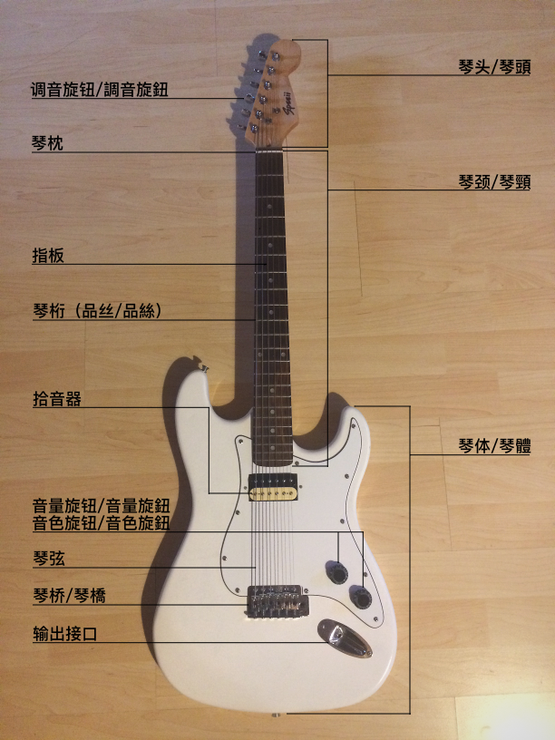 中文（中国大陆）: 电吉他组成部分图解